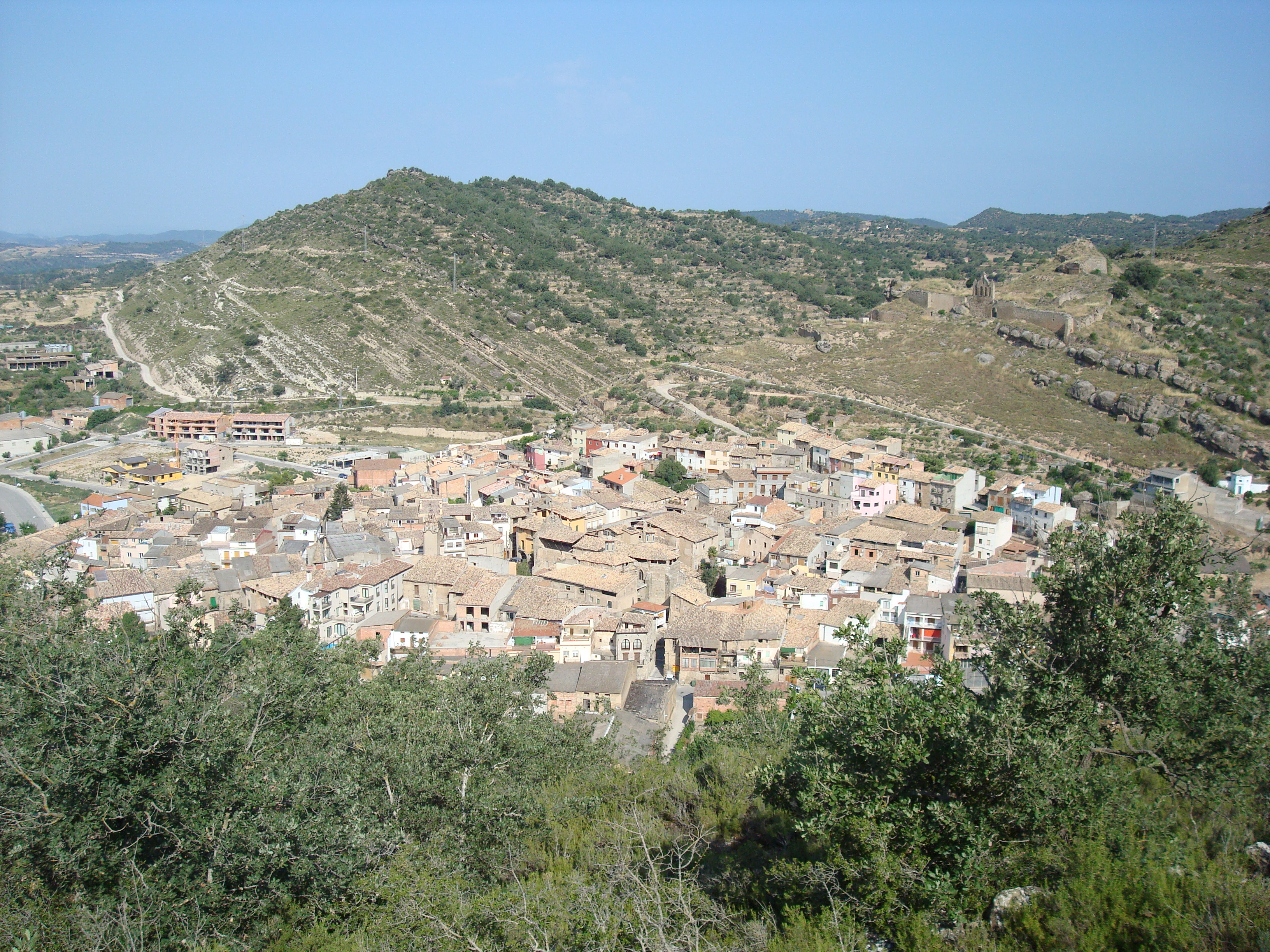 La Muntanya de Rocabandera, al fons